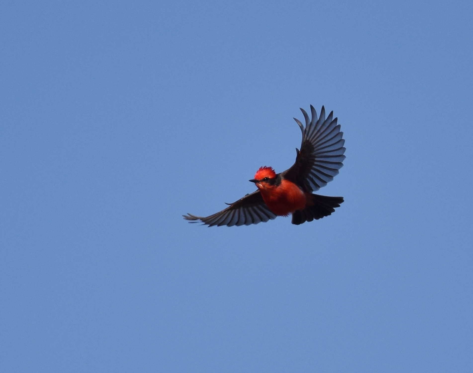 AZ Day 3